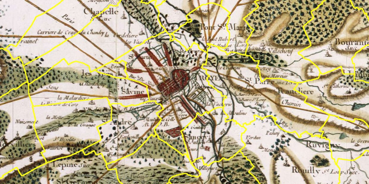 La ville de Troyes sur un extrait de la carte de César-François Cassini, 1765.